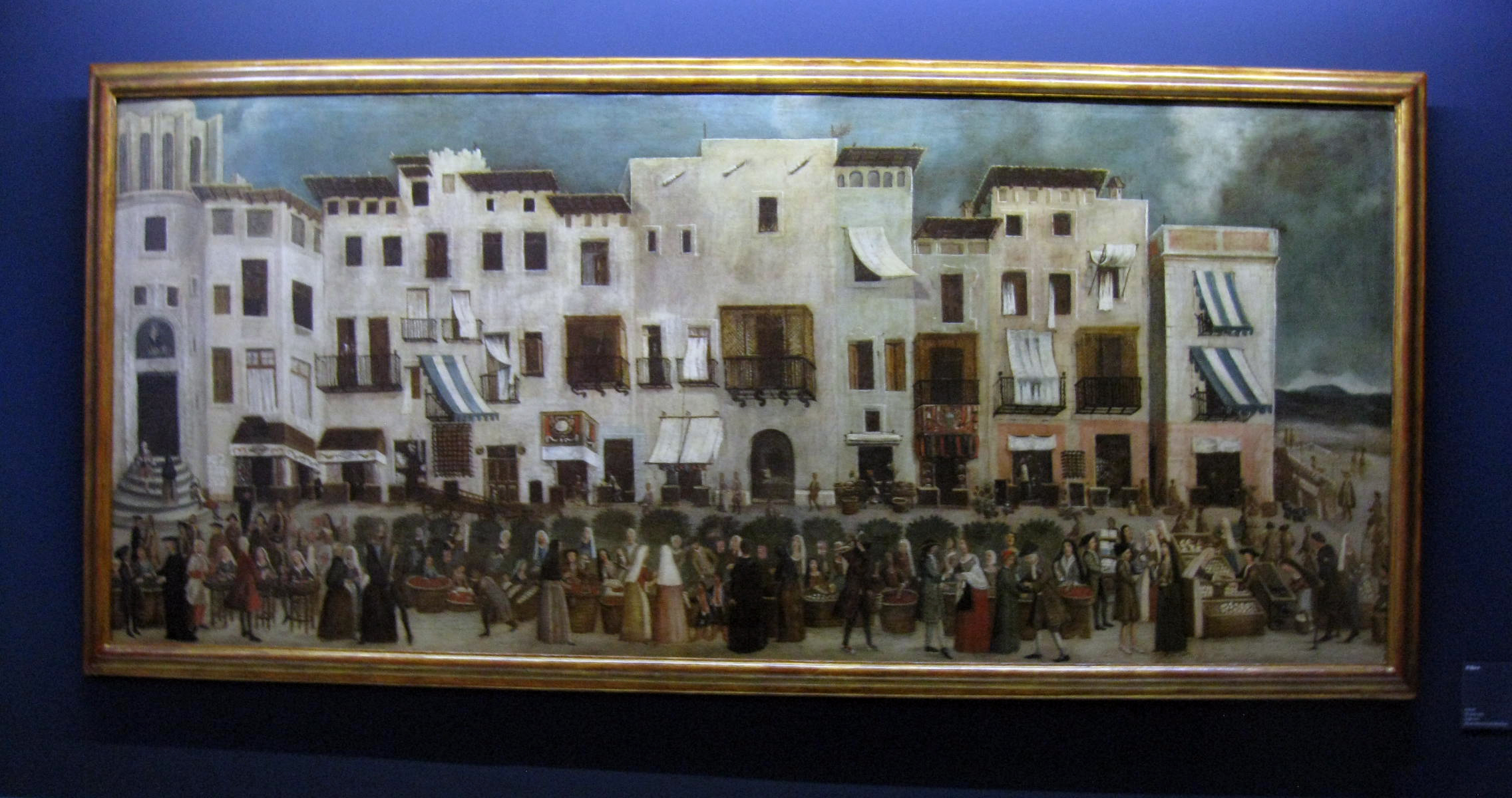 Palau Reial Major (Barcelona)